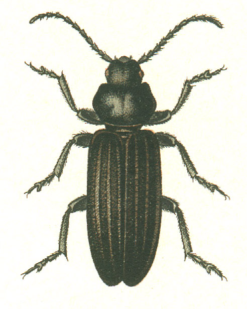 Asemum striatum